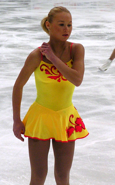 Julia Obertas während der Russischen Meisterschaften 2005